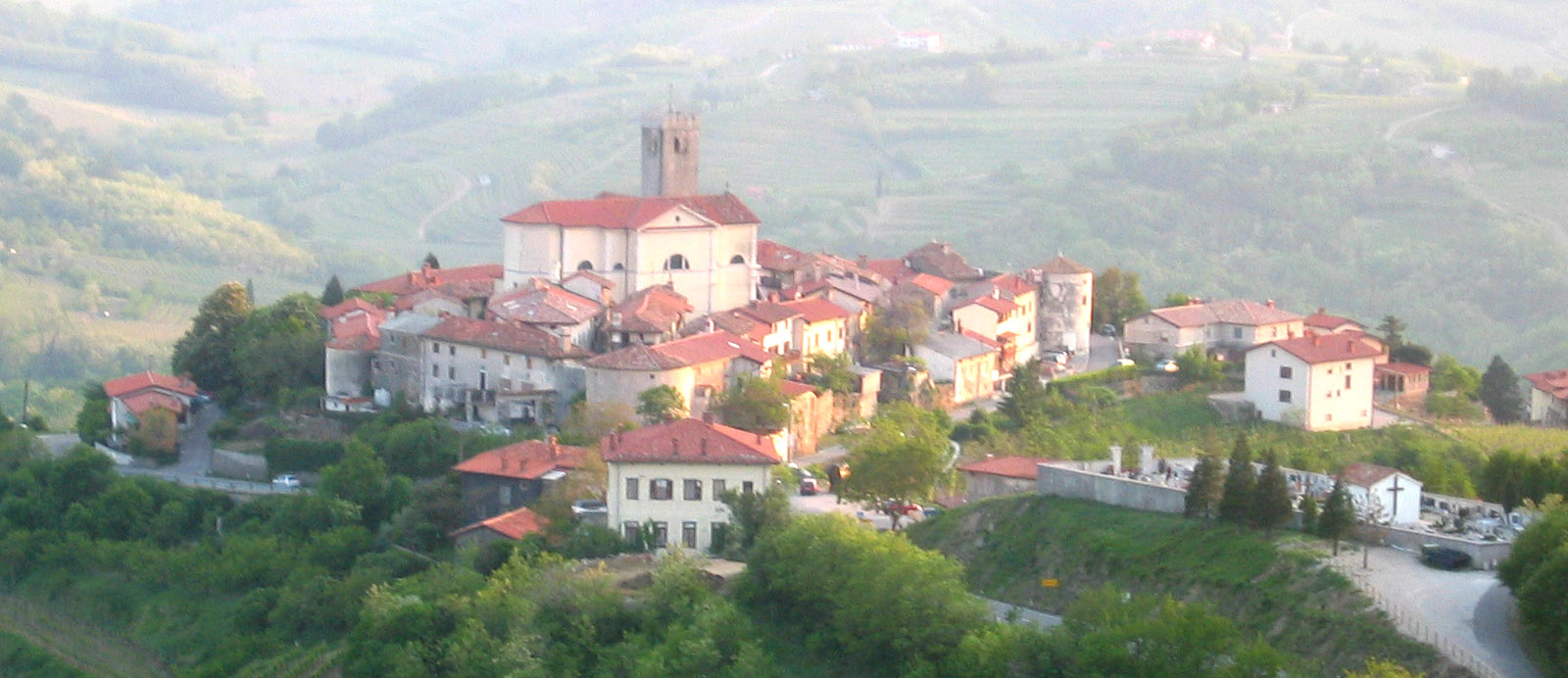 Šmartno, village in Goriška Brda area, Slovenia